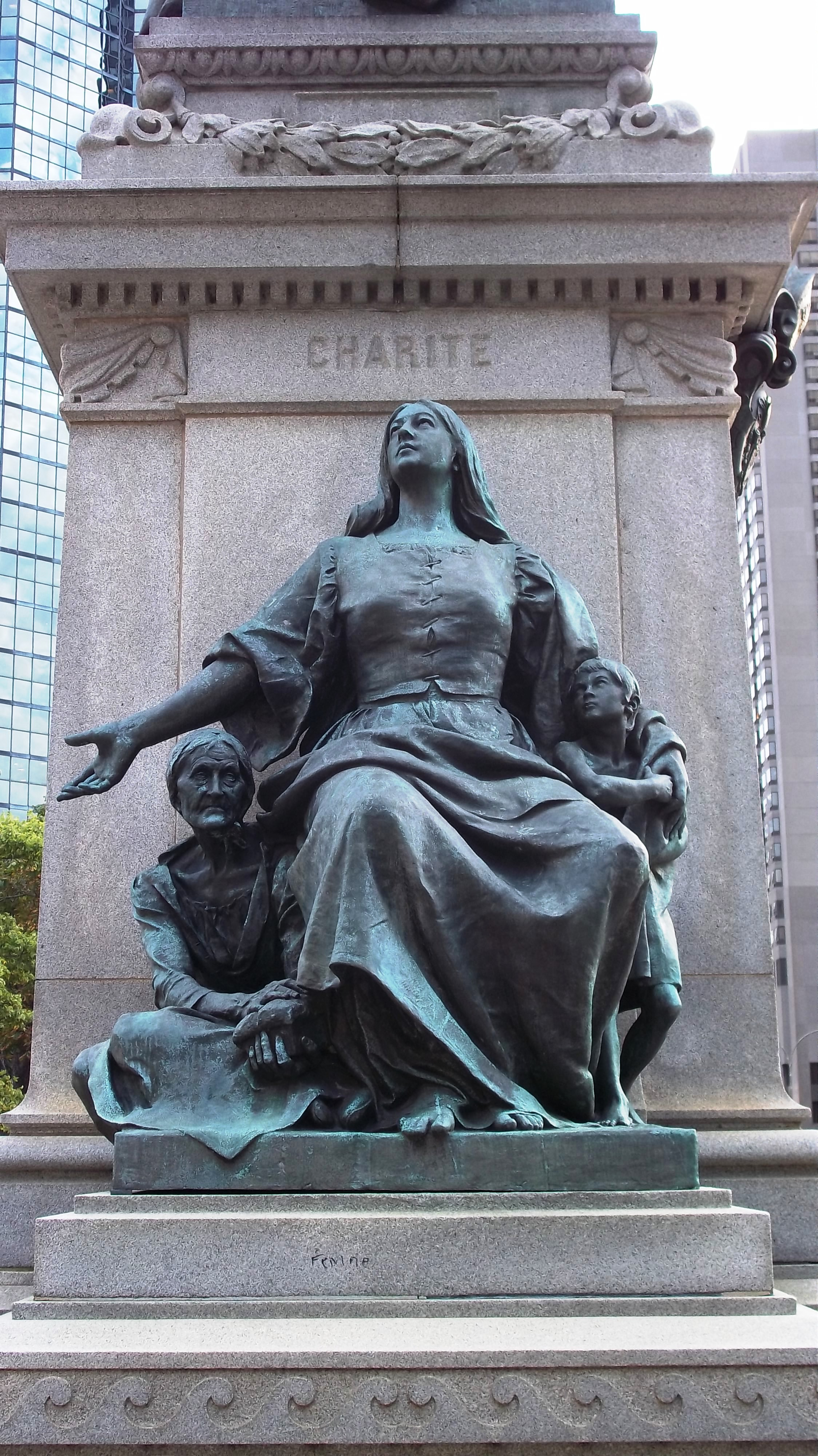 Monument à Ignace Bourget, situé devant la Basilique-cathédrale Marie-Reine-du-Monde, boulevard René-Lévesque Ouest, Montréal